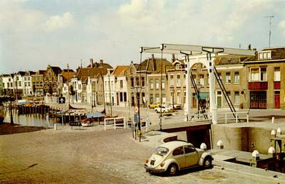 de Sint Maartensbrug in 1975